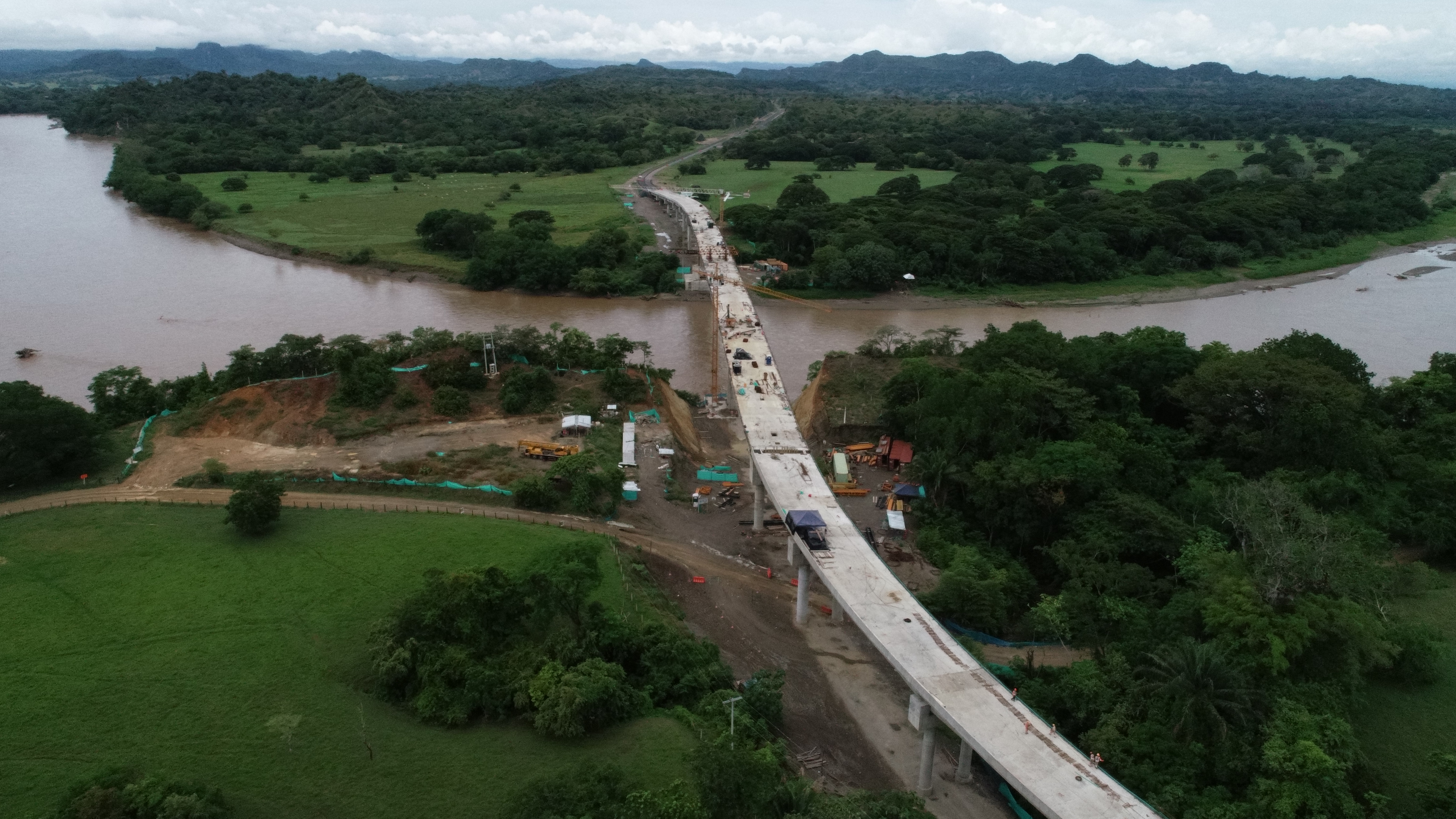 Puerto Bogotá-Puerto Salgar